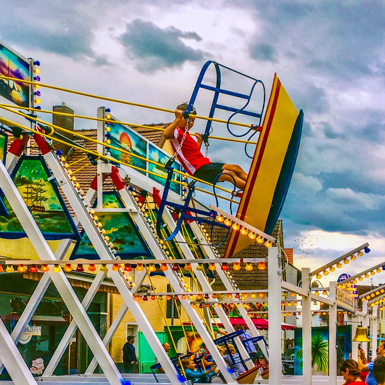 Schiffschaukel